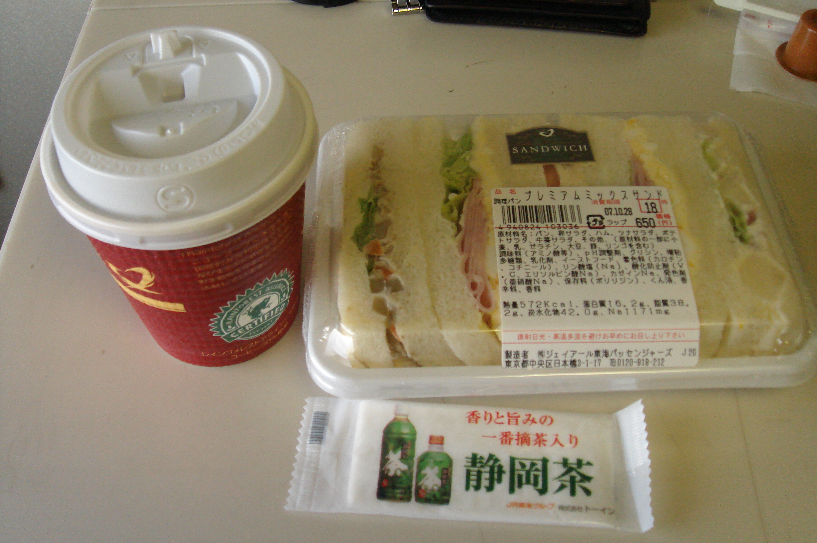 上りはやぶさ号車内販売の例